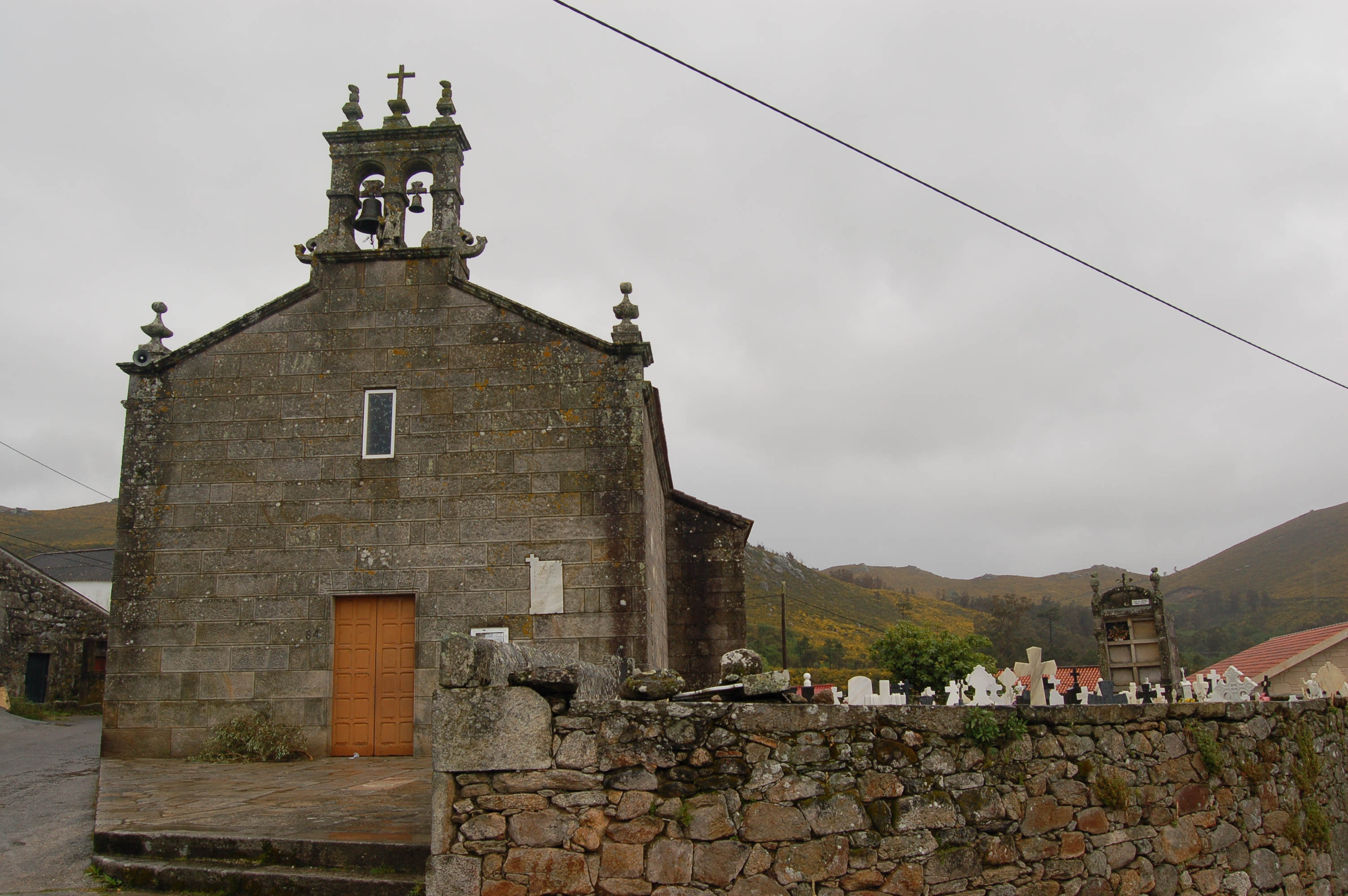 Igrexa parroquial de San Martiño de Lariño (Carnota).